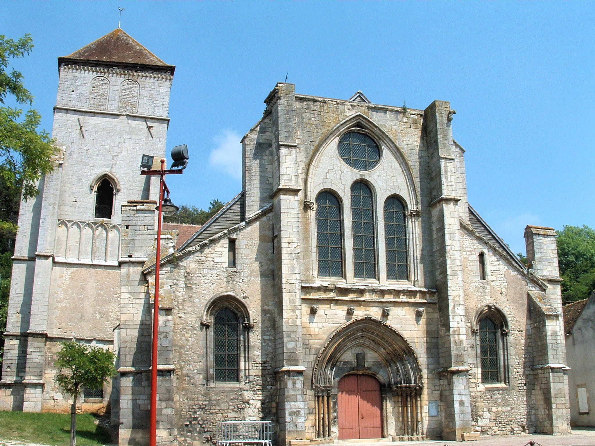 Gy-l'Évêque - Eglise